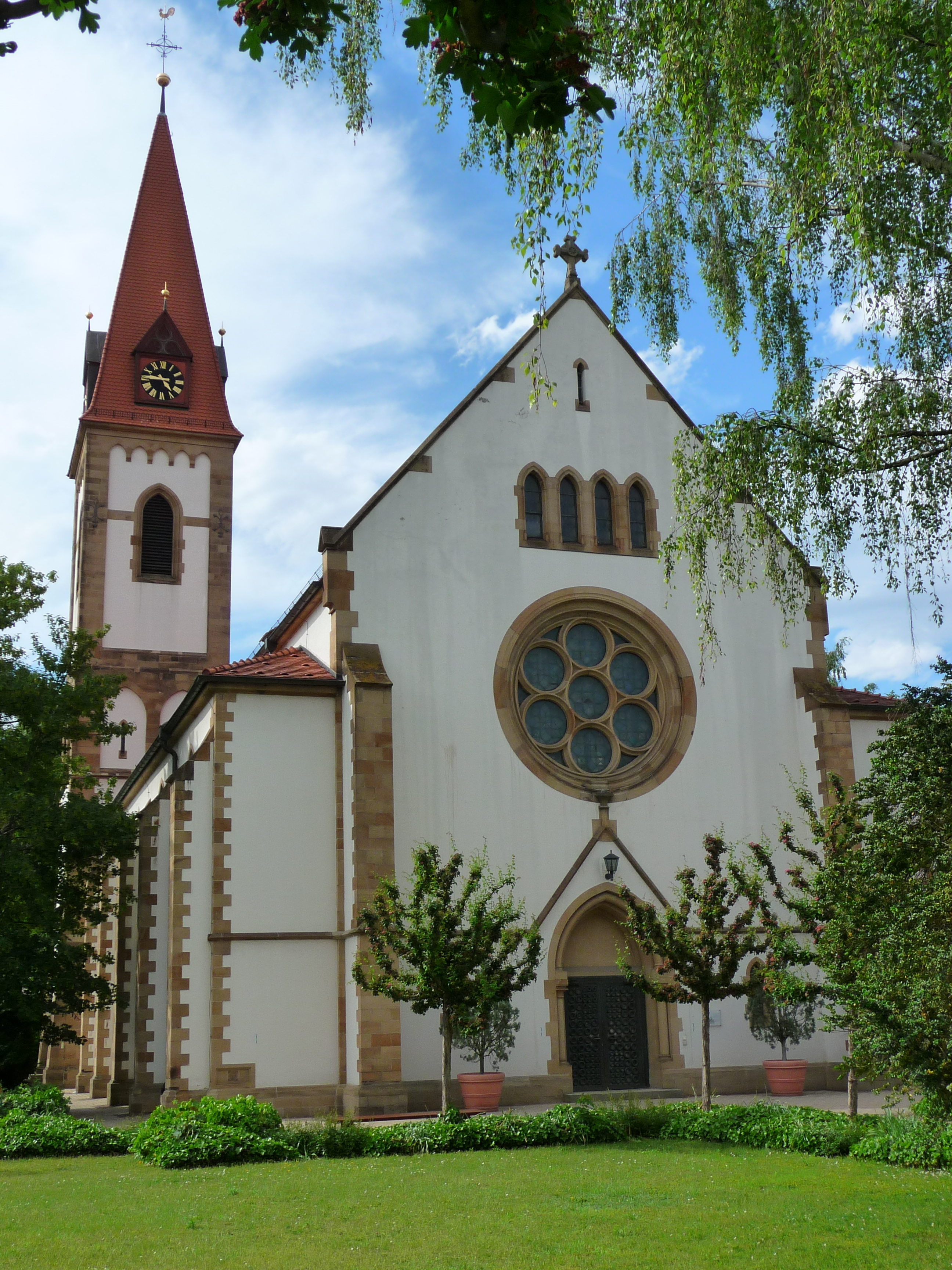 Katholische Kirche St. Kilian in Oftersheim (Rhein-Neckar-Kreis, Deutschland)